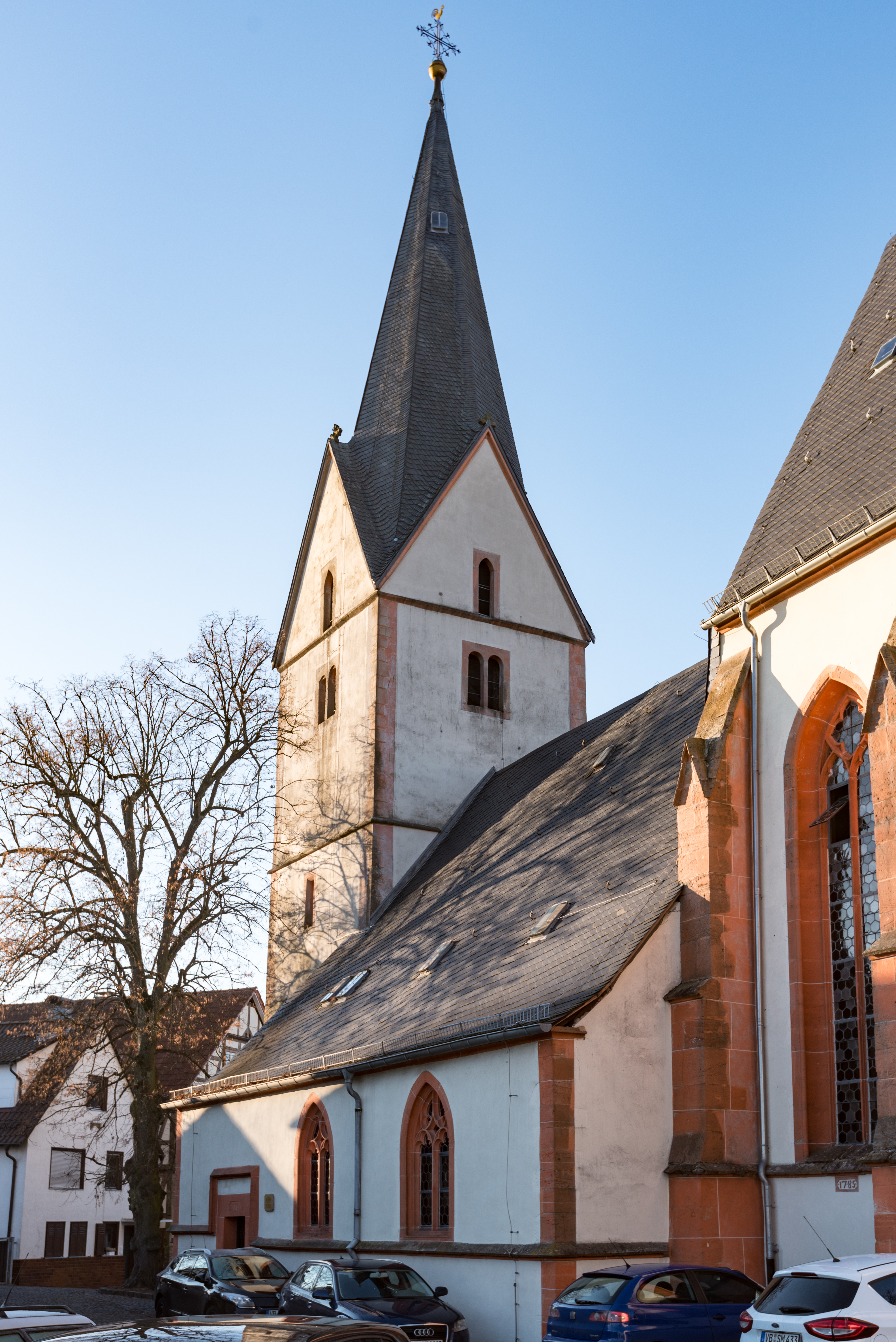 Homberg (Ohm), An der Stadtkirche 11, Ev. Stadtkirche